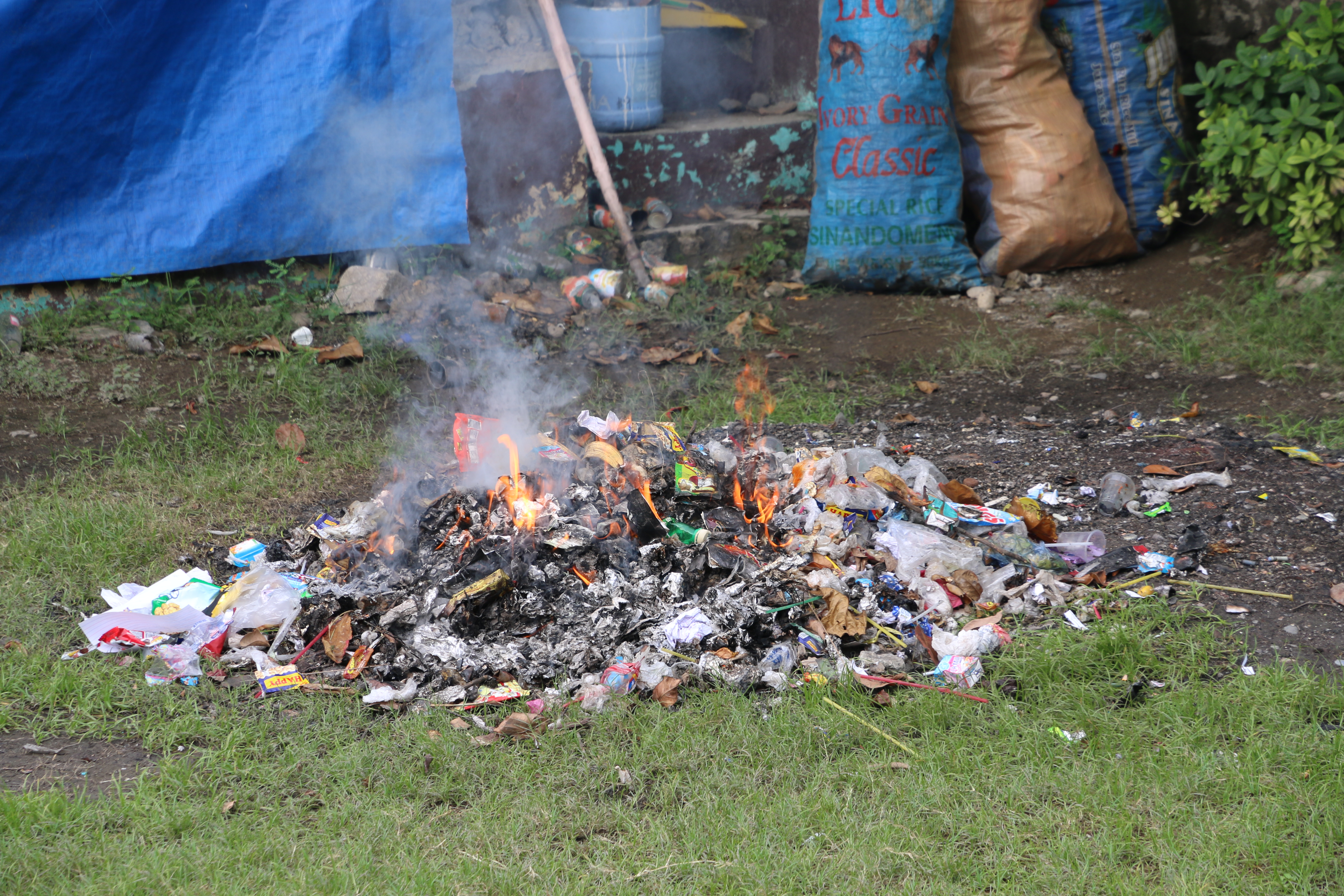 Burning garbage